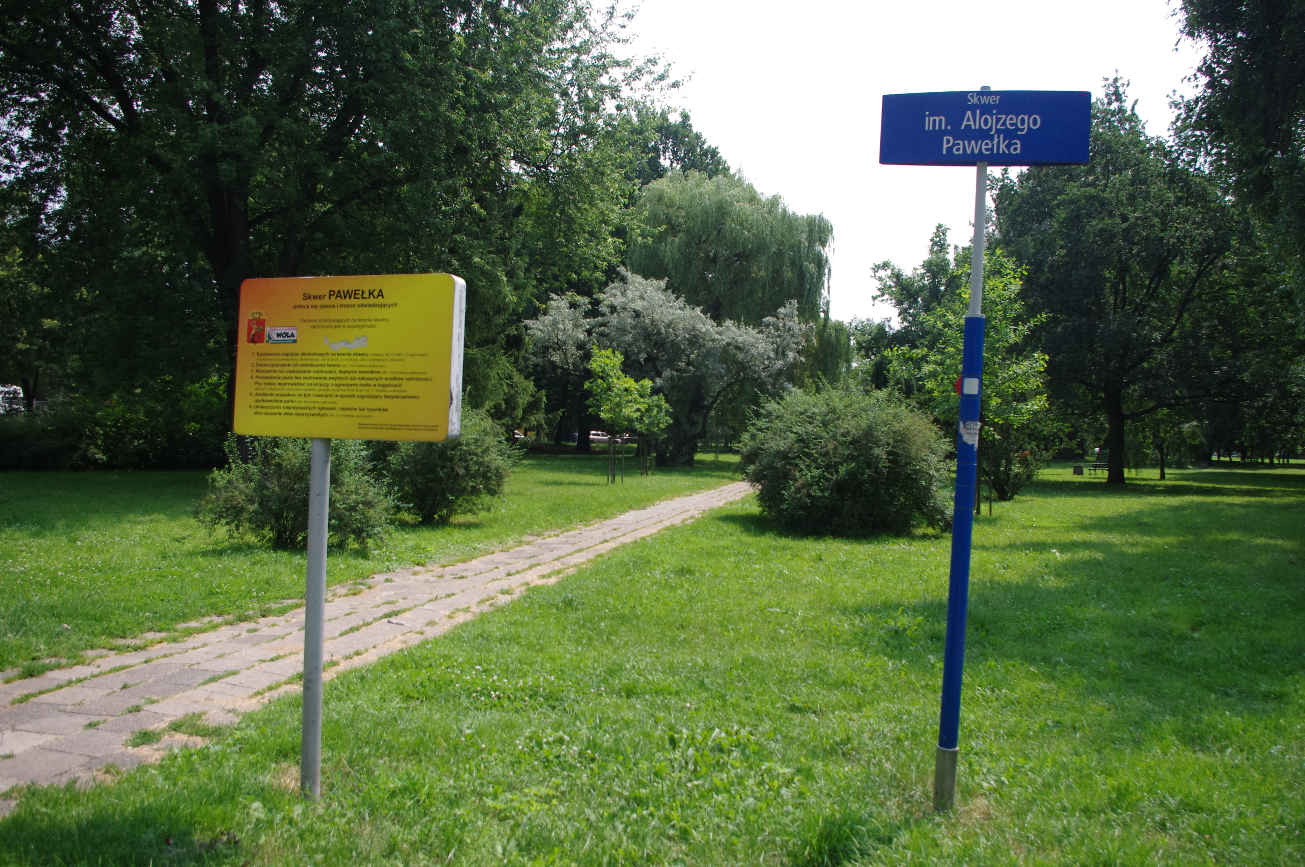 Skwer im. Alojzego Pawełka na warszawskiej Woli w osiedlu Czyste.